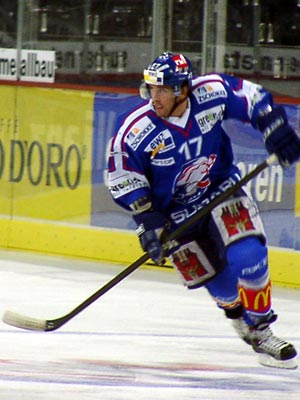 Daniel Steiner im Hallenstadion, Zürich